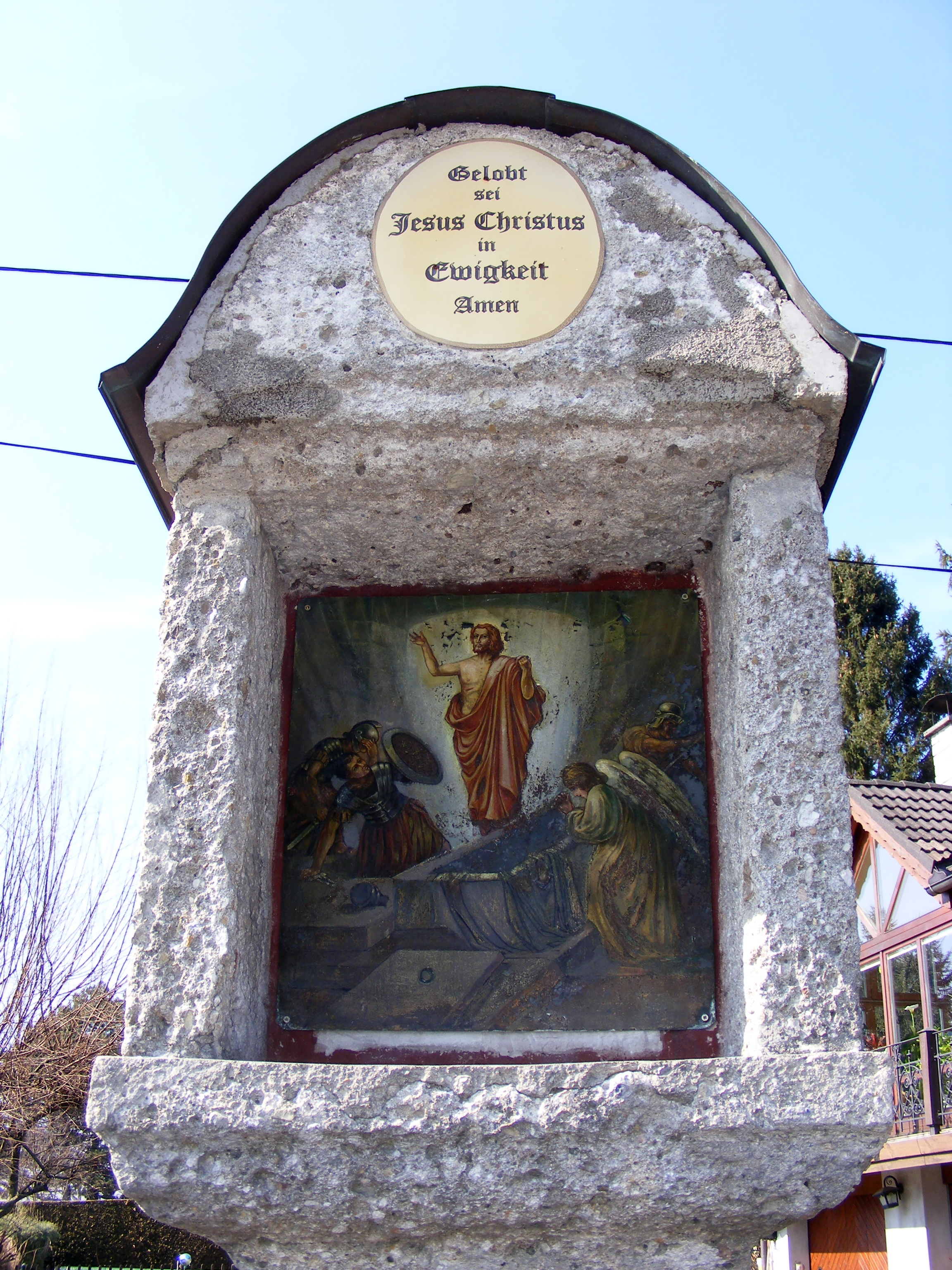 Bildstock XI der Geheimnissäulen auf dem Weg nach Maria Plain, Bergheim, Land Salzburg, Österreich